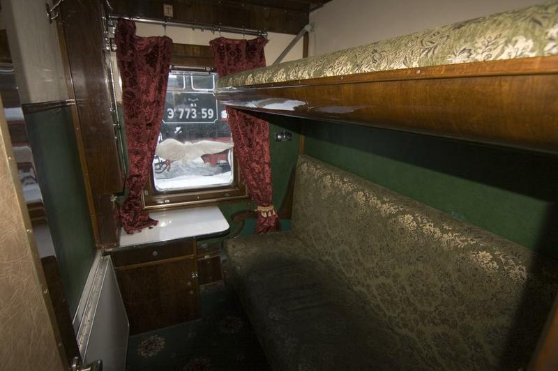 Вагон-салон № 75112 в експозиції Київської виставки рухомого складу історичних локомотивів та вагонів. Інтер'єр купе референтів